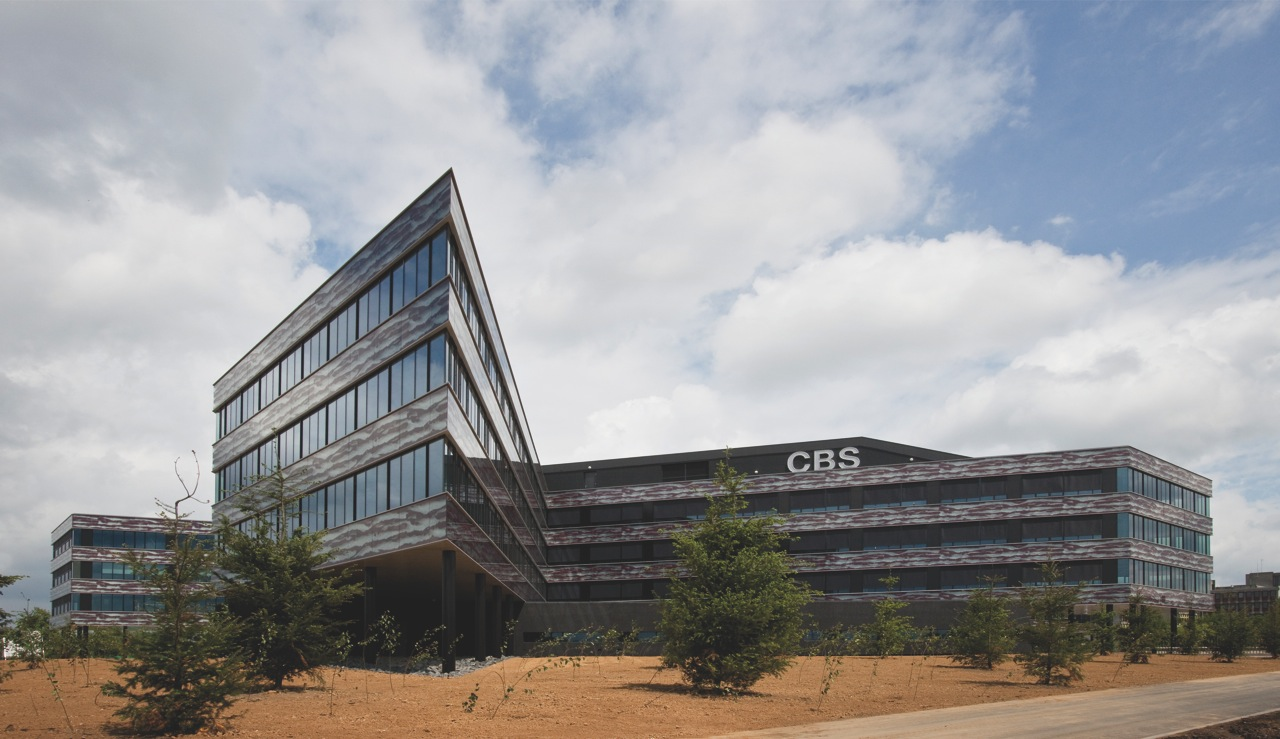 Het nieuwe kantoor van de CBS(Centraal Bureau voor de statistiek) in Heerlen.